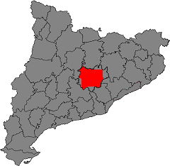 Àrea de la Denominació d'Origen Pla de Bages